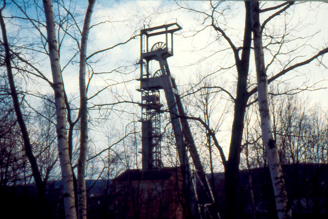 Fördergerüst der Schachtanlage Hildesia bei Diekholzen